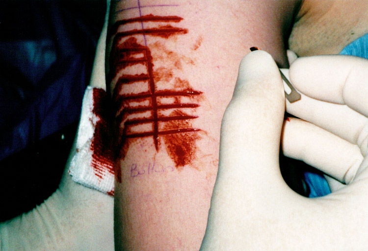 scarification